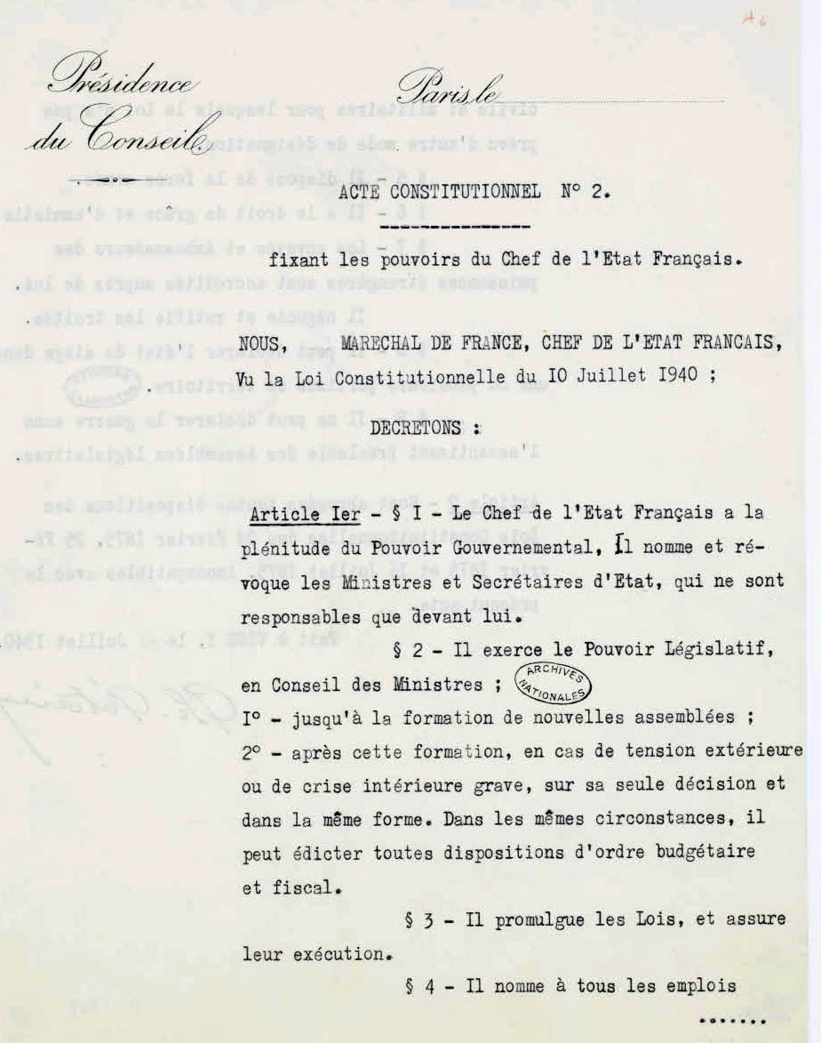 Acte constitutionnel numéro 2 fixant les pouvoirs du chef de l'État français, signé par Pétain le 11 juillet 1940